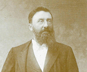 Eduard Wille - burgemeester van Zomergem - Oost-Vlaanderen - Vlaanderen - België